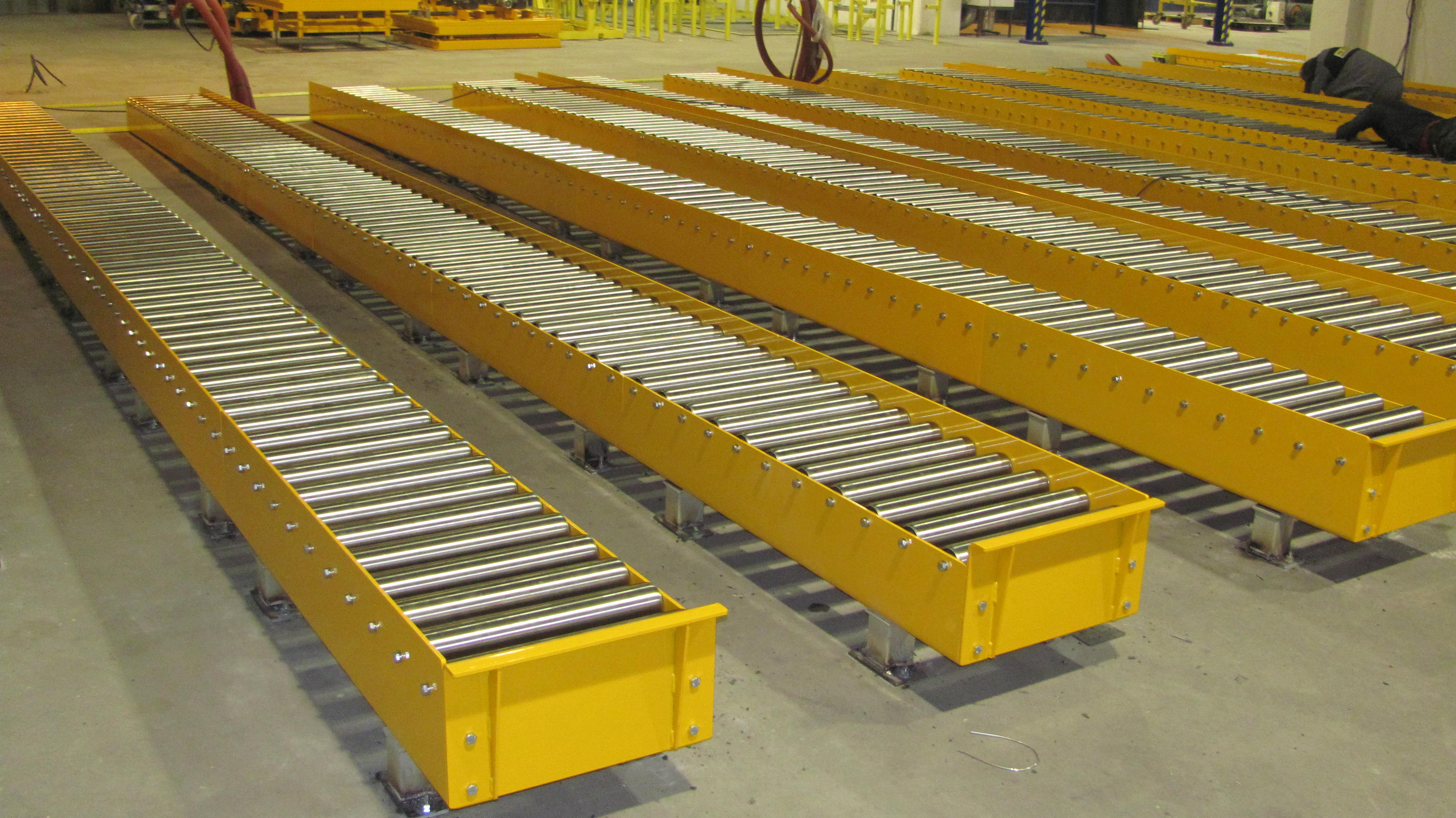 Válečkový dopravník pro distribuční centra. Vyrobil LOGSYS a.s.